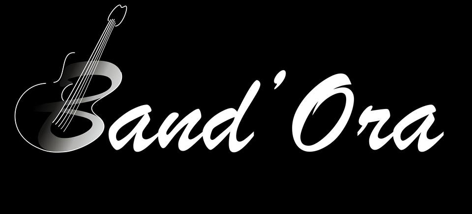 A bandorások logója, készült 2015-ben.